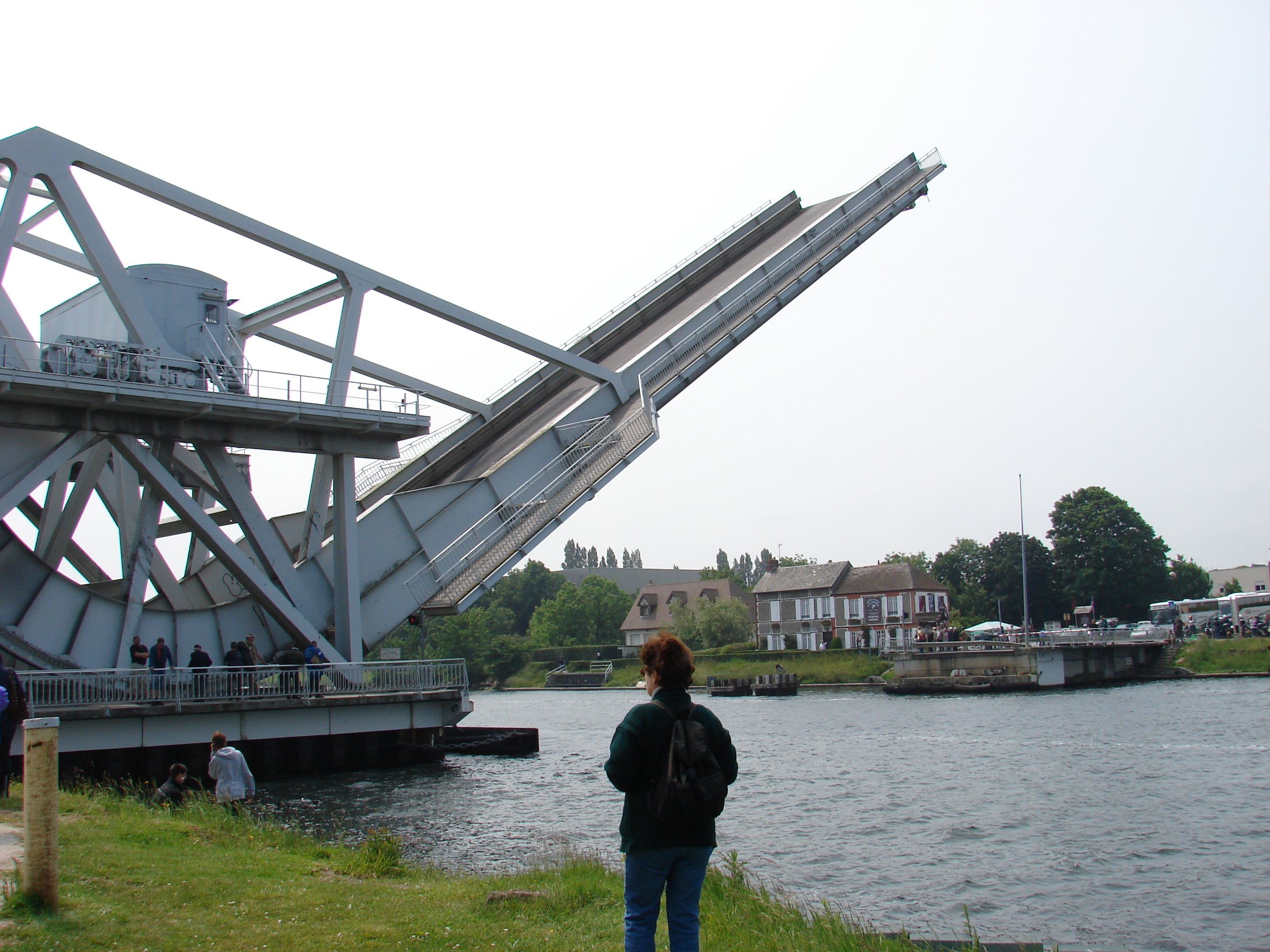 Ponte sobre o Canal de Caen ponte "Pegasus",05/06/2007